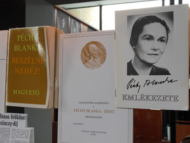 A fotó a magyar beszédművelési mozgalom történetét bemutató kiállításon készült, A Magyar Nyelv Múzeumában.